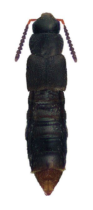 Leptusa carolinensis